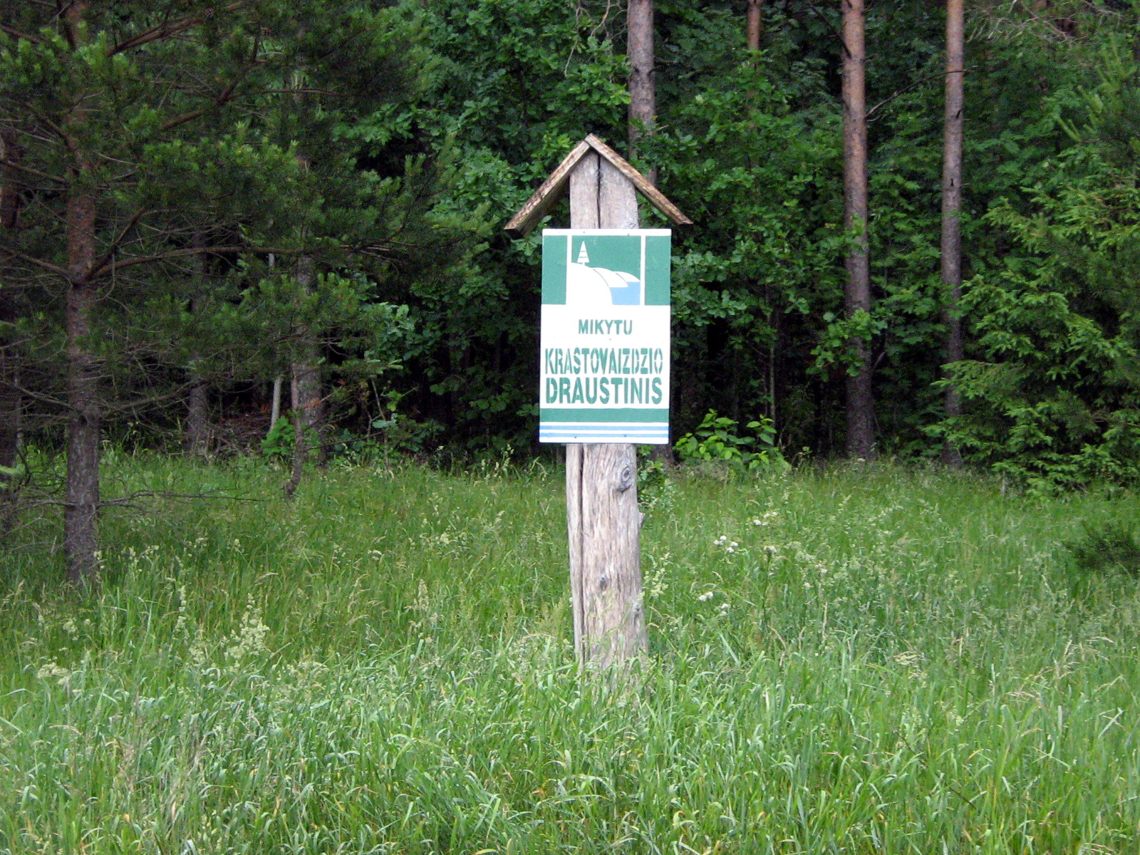 Mikytų kraštovaizdžio draustinis, Plungės rajonas, Žemaitijos nacionalinio parko teritorija Foto: Algirdas, 2007 m. birželio 15 d., Lietuva